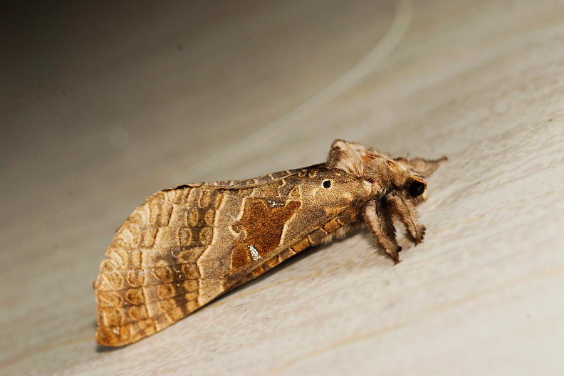 Endoclita sinensis (Moore, 1877)